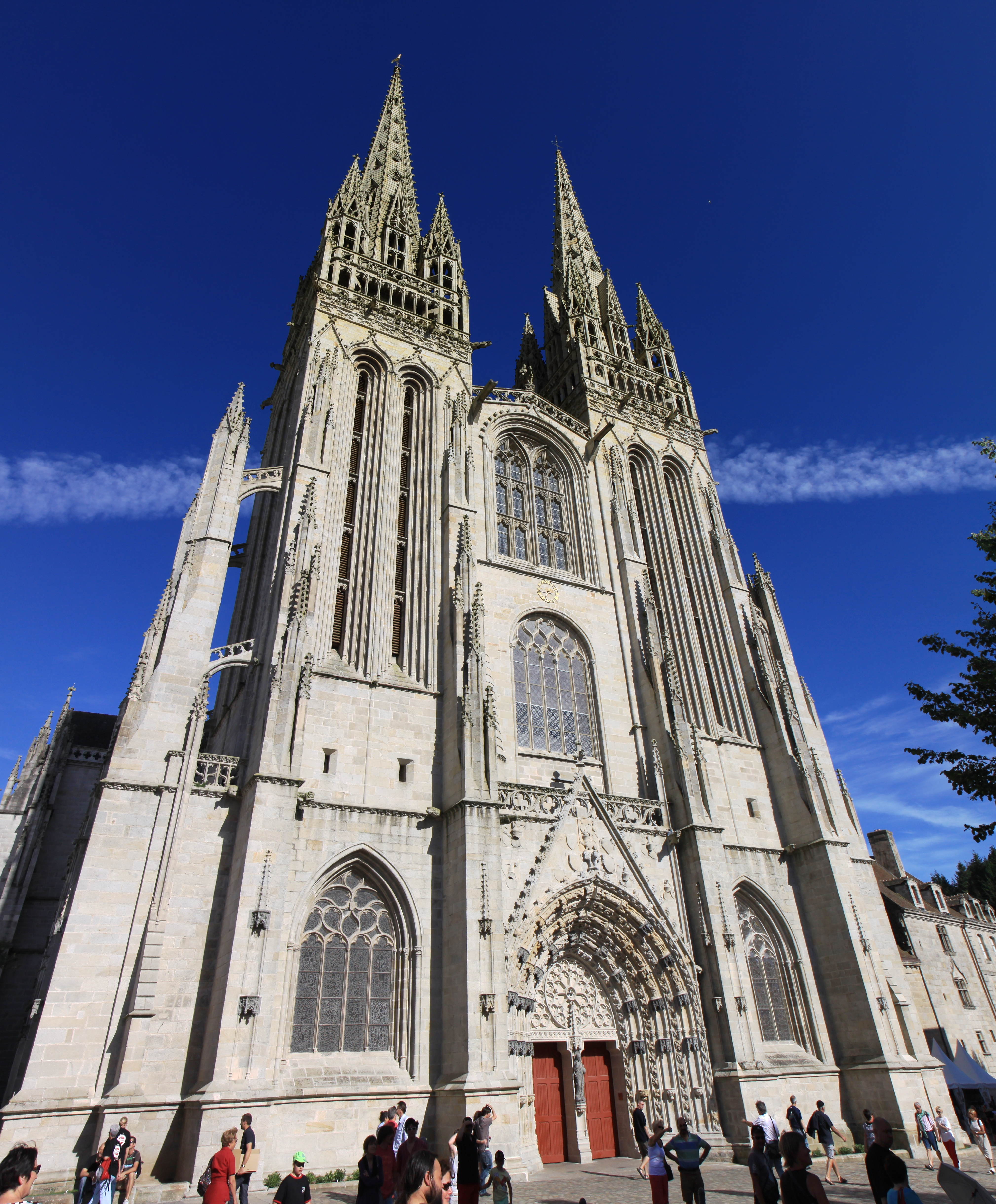 Vue de la façade de la cathédrale Sain-Corentin de Quimper.